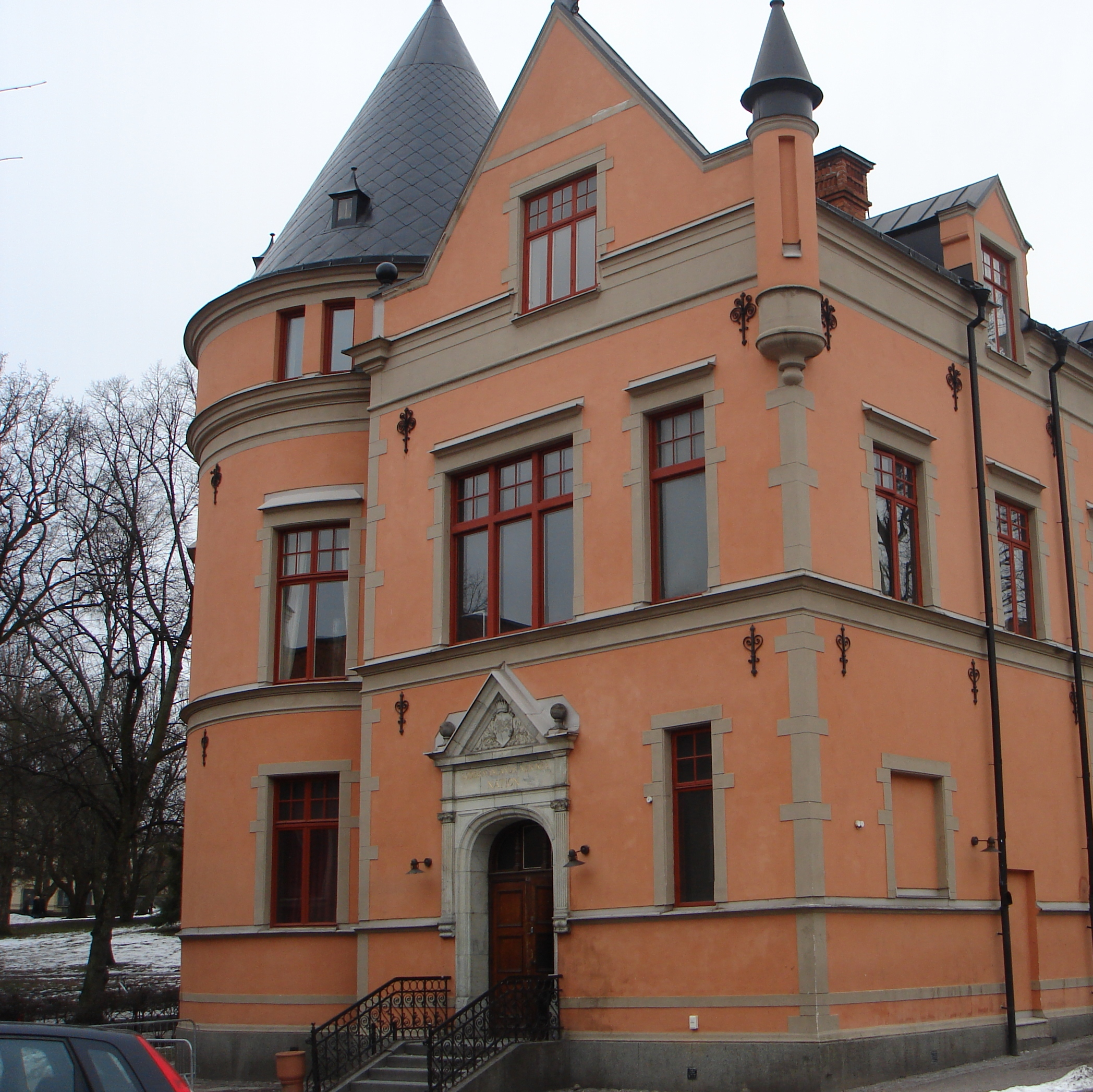 Södermanlands-Närke nation, Uppsala, Sweden